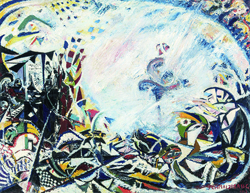 Jules Schmalzigaug, Het dynamische van de dans, 1913, olieverf op doek, 100 x 129,6 cm.